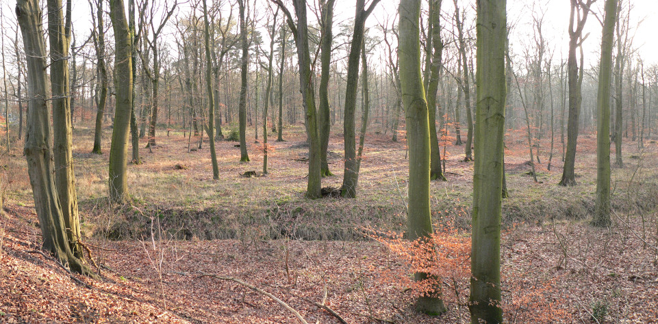 Hämeler Wald - Foto aufgenommen von Benutzer Benutzer:AxelHH, Februar 2007